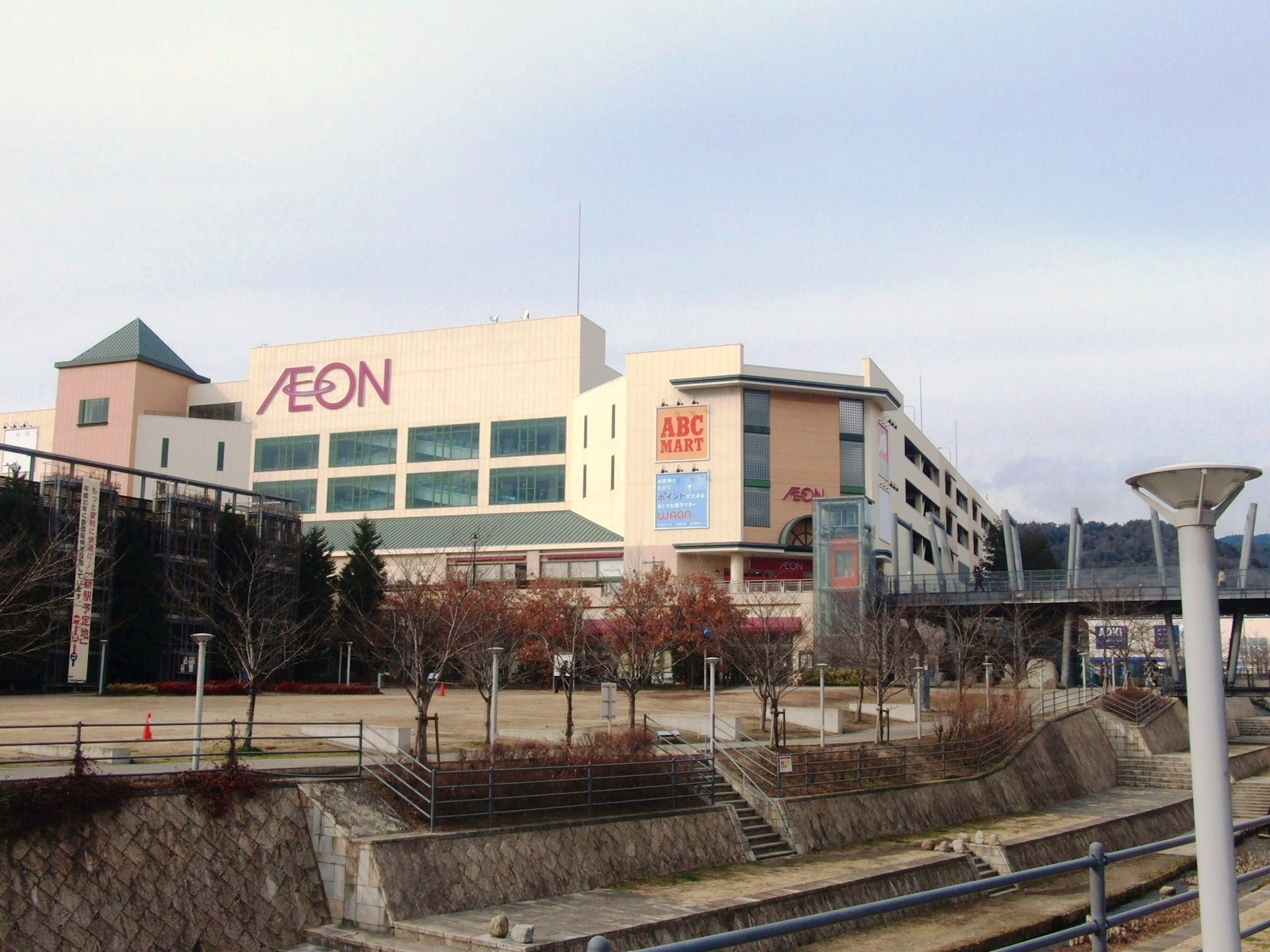 箕面マーケットパーク・ヴィソラを撮影